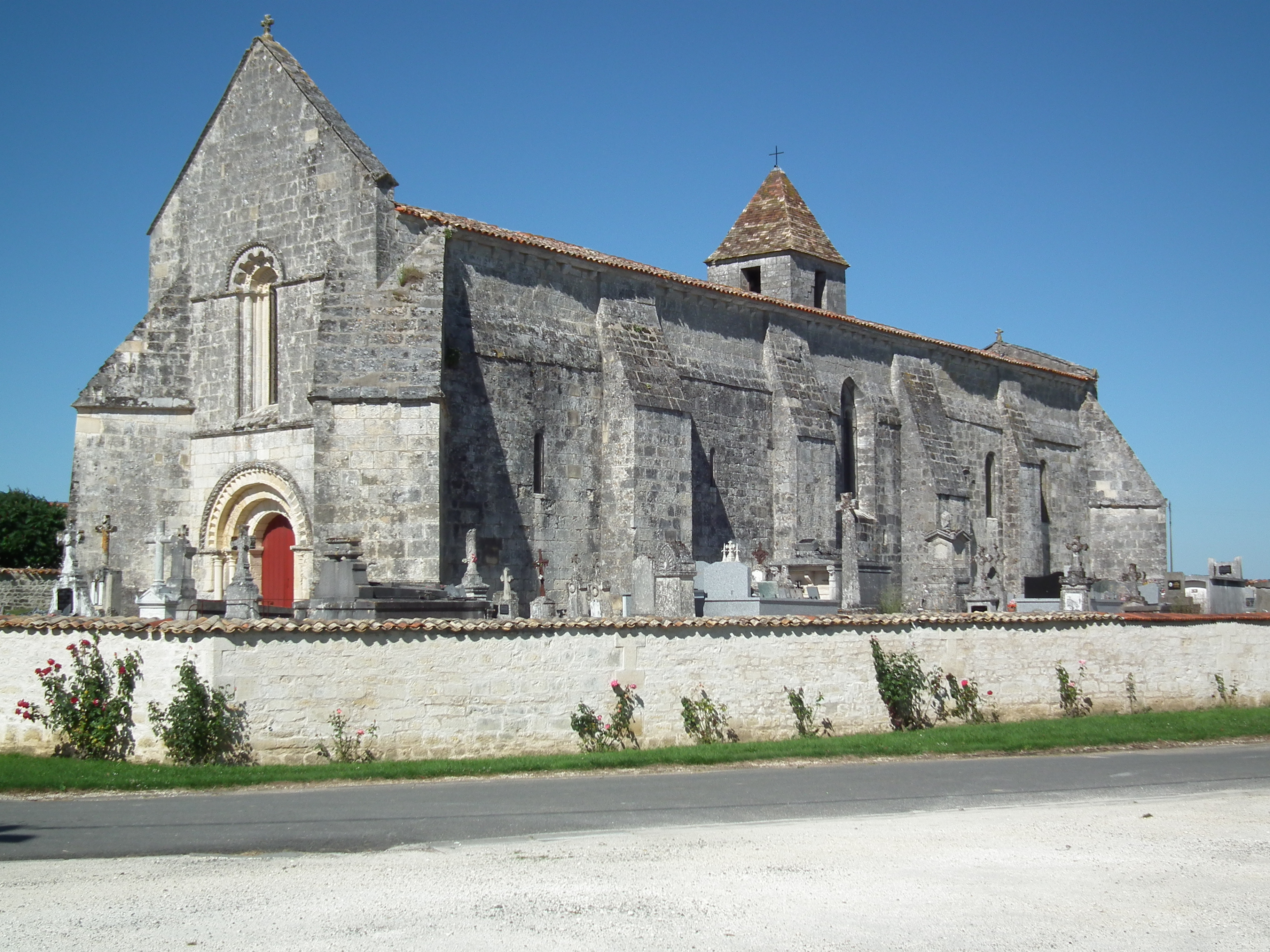 L'église d'Agudelle